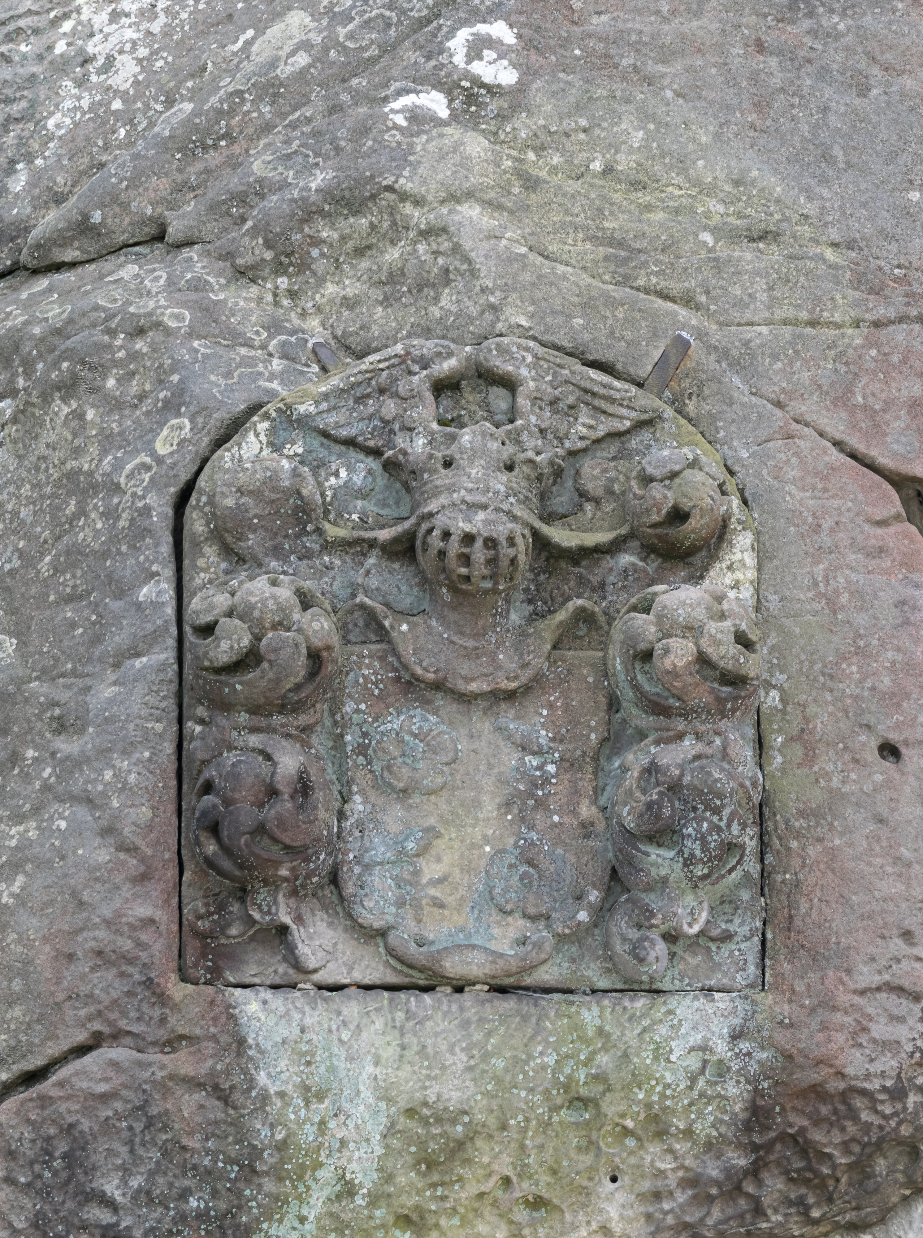 eingelassenes Wappen der lippischen Grafen an den Externsteinen